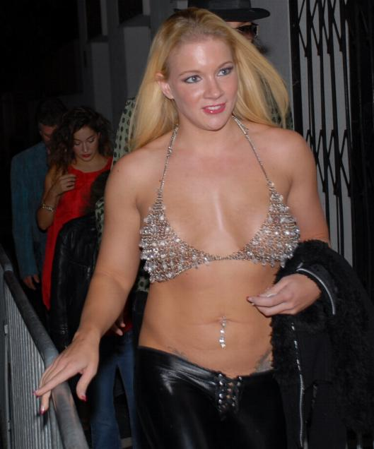 Heidi Mayne, September 22, 2007.